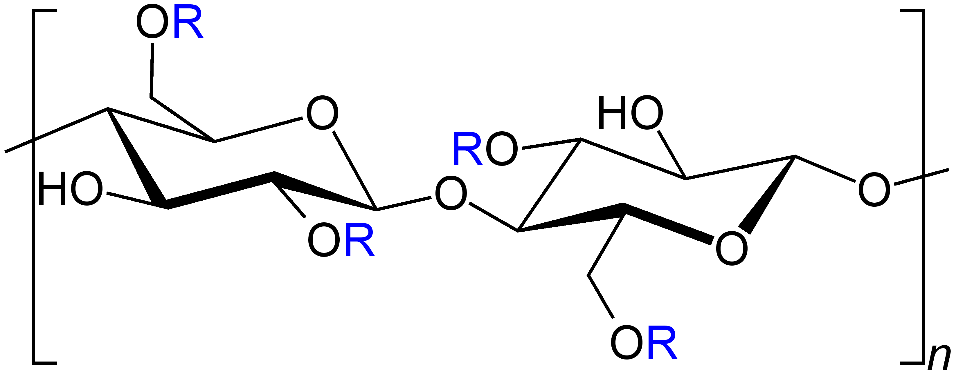 Hydroxyethylcellulose mit mittlerem Substitutionsgrad